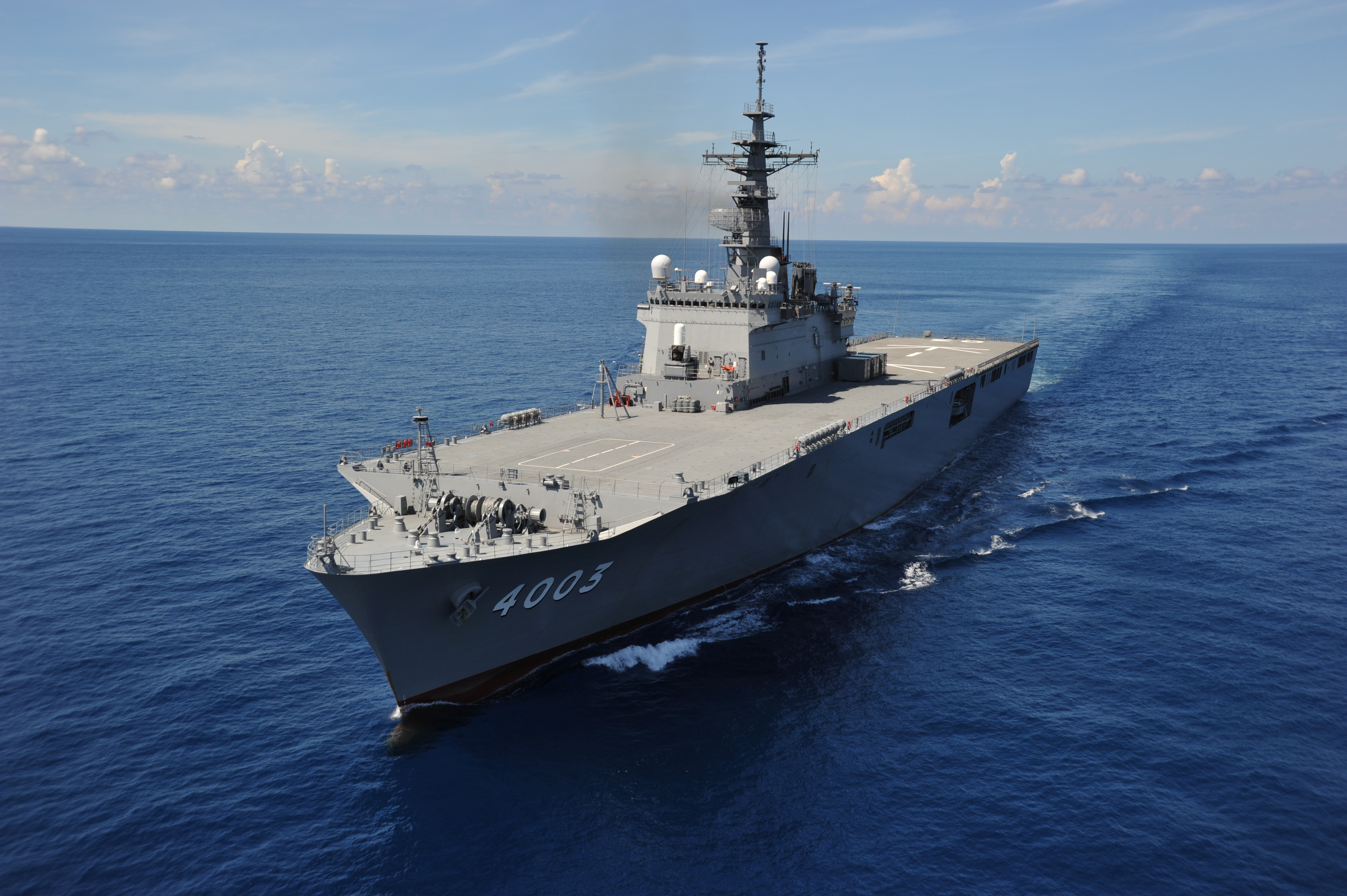 輸送艦「くにさき」